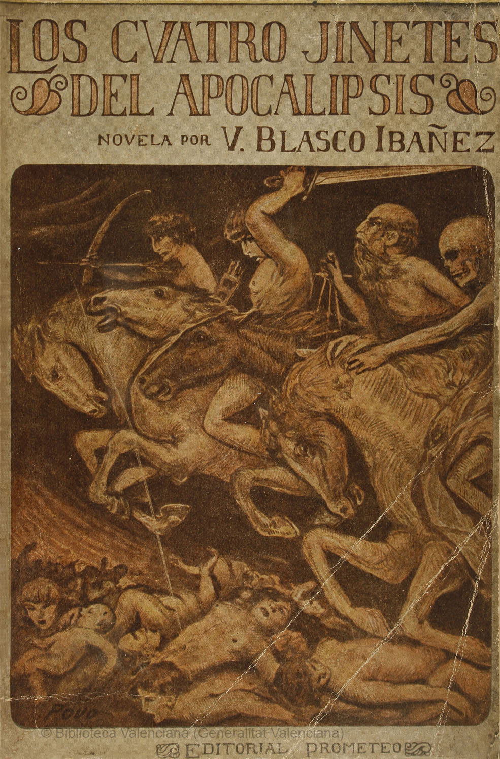 Cubierta de Los Cuatro Jinetes del Apocalipsis, editada en Valencia por Prometeo en 1929